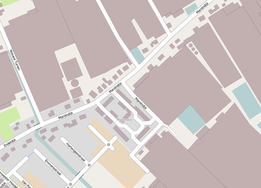 geografische kaart via [1]